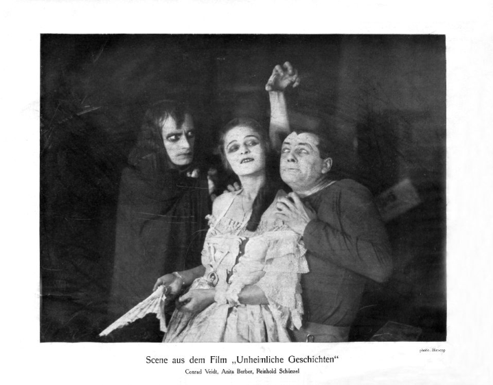 Szene aus dem Film "Unheimliche Geschichten"; abgebildete Personen: Conrad Veidt, Anita Berber, Reinhold Schünzel